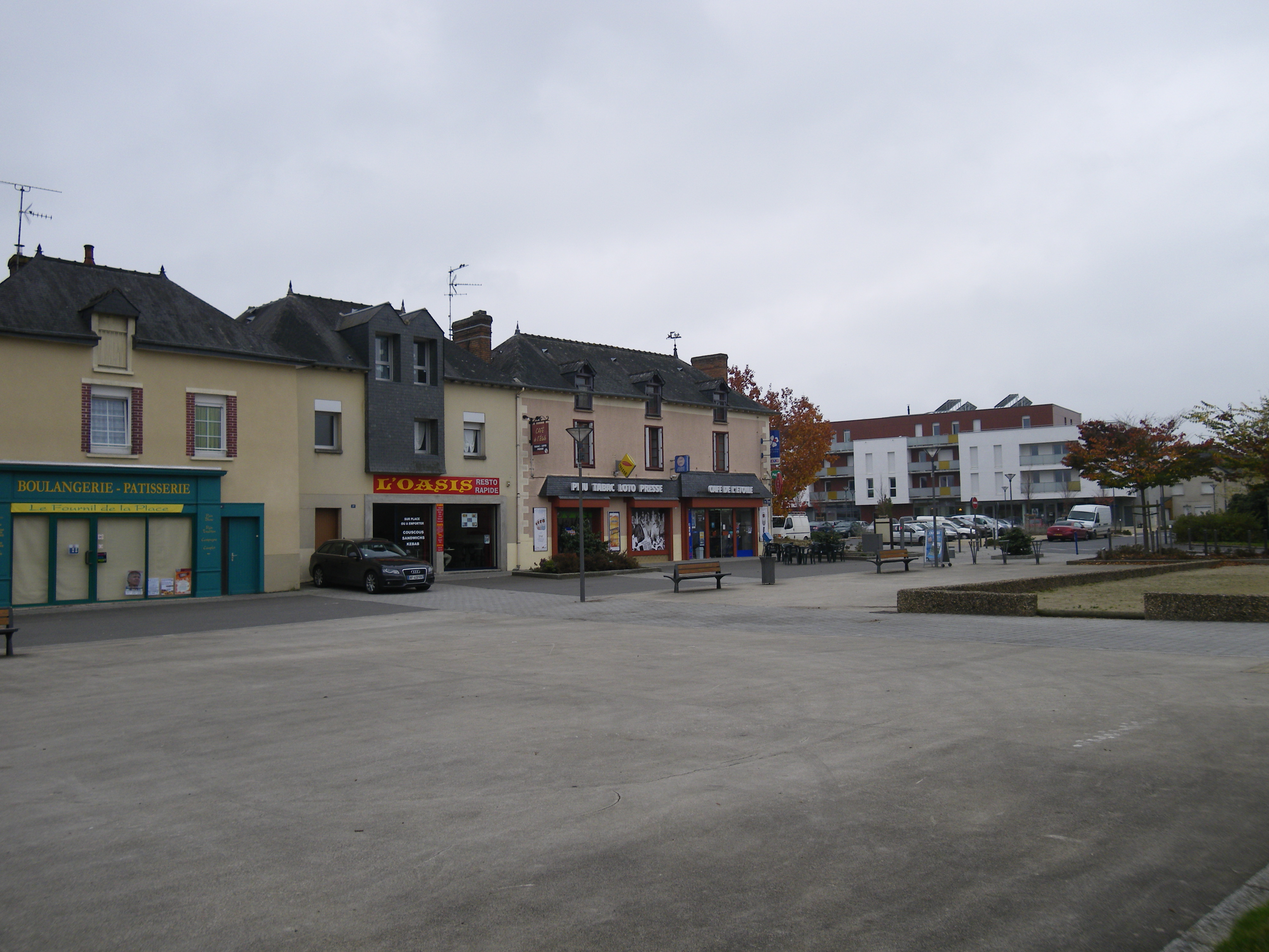 montgermont centre